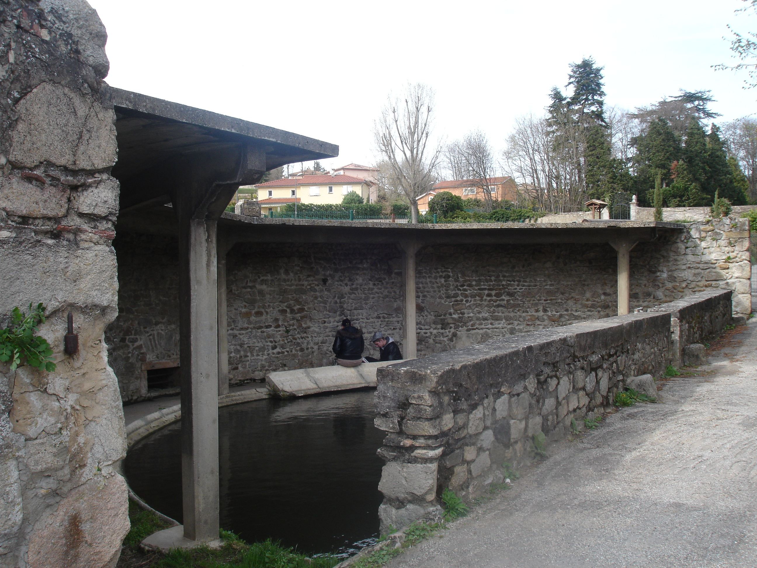 Irigny (69) : Le lavoir de La Combe